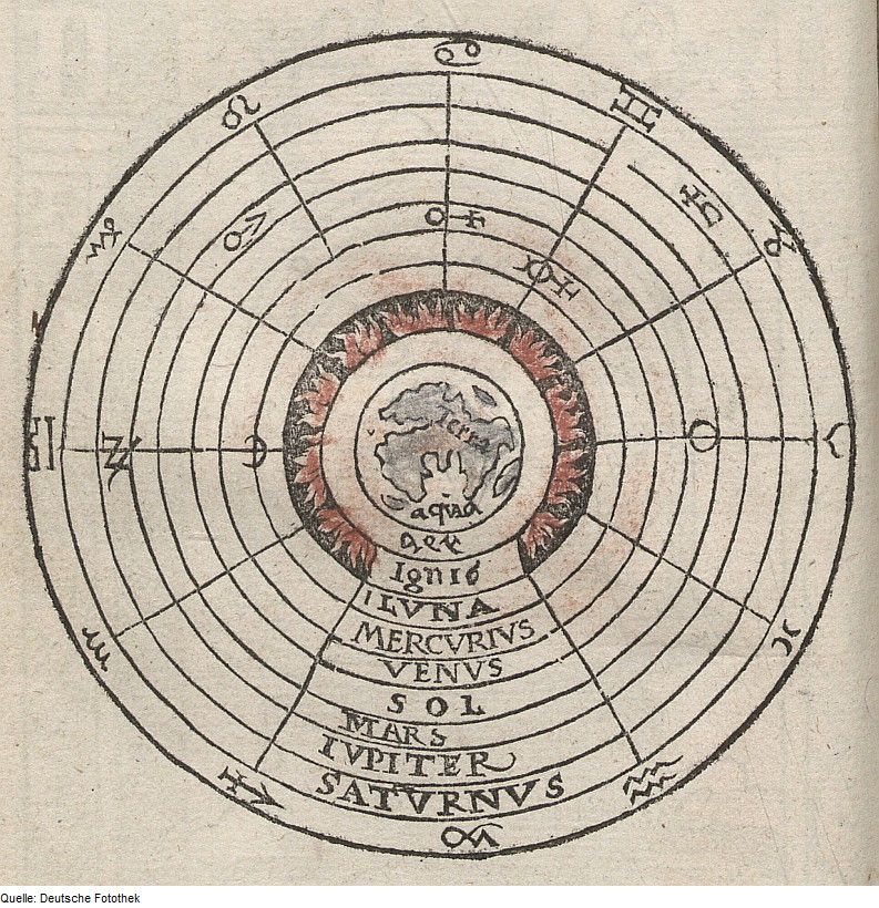 Original image description from the Deutsche Fotothek Geographie & Karte & Astronomie & Gestirn